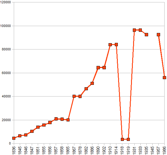 Grafik über die Anzahl der Spindeln in der Augsburger Kammgarn-Spinnerei